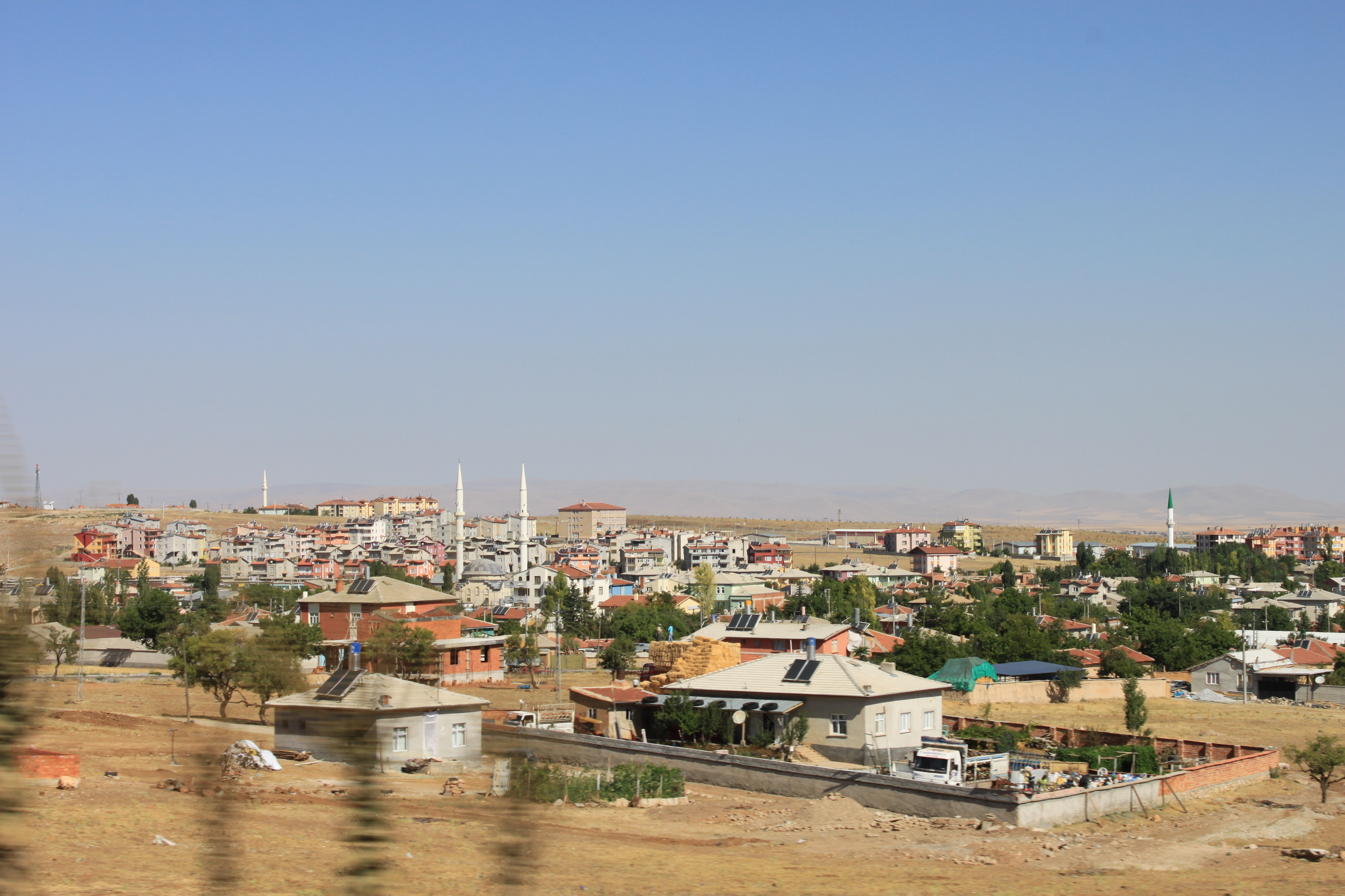 Stadt Kadınhanı, Provinz (il) Konya, Türkei, im Sommer